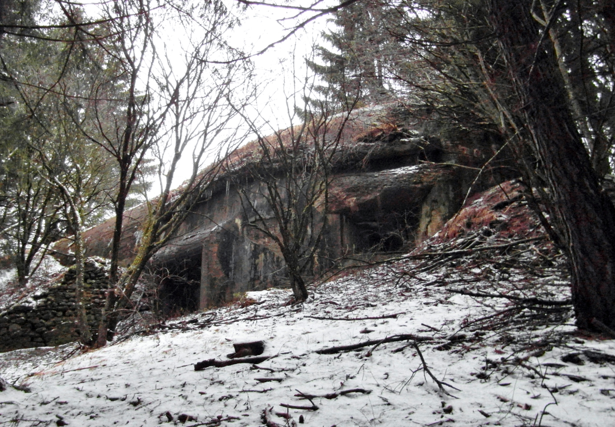 Opera 7.1 Dobbiaco